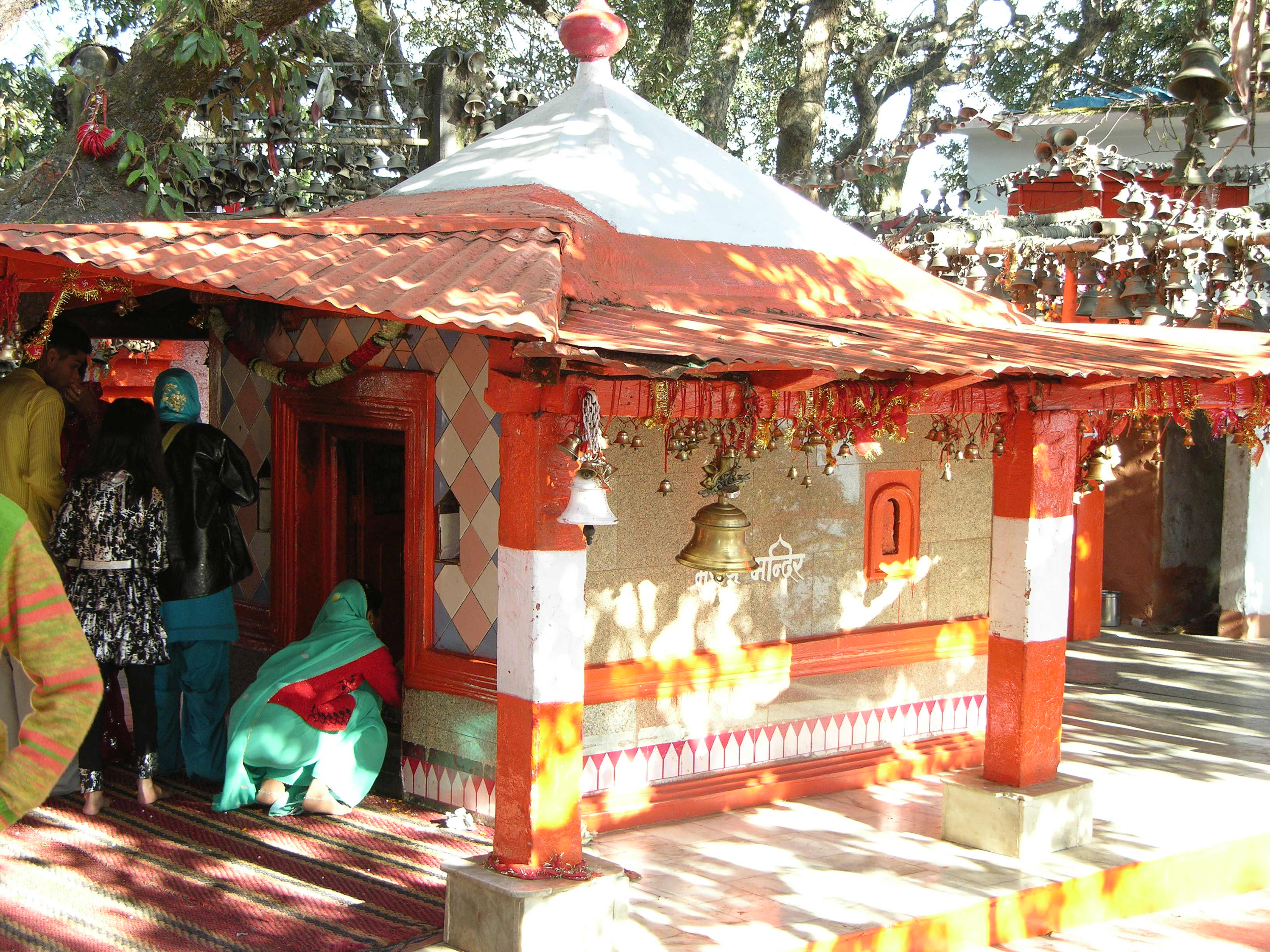 Photo taken by Ritesh Sagar, Enjoy Music Channel, Nainital